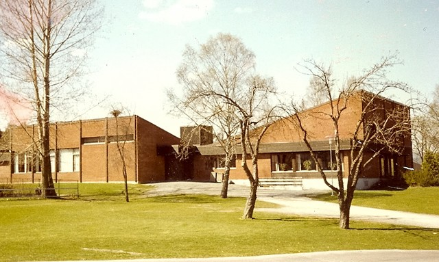 Mjøndalen kirke